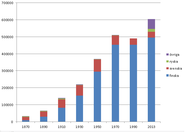 Befolkningsutveckling i Helsingfors, uppdelad per språkgrupp. Källa (1870-1990): Källa för 2013